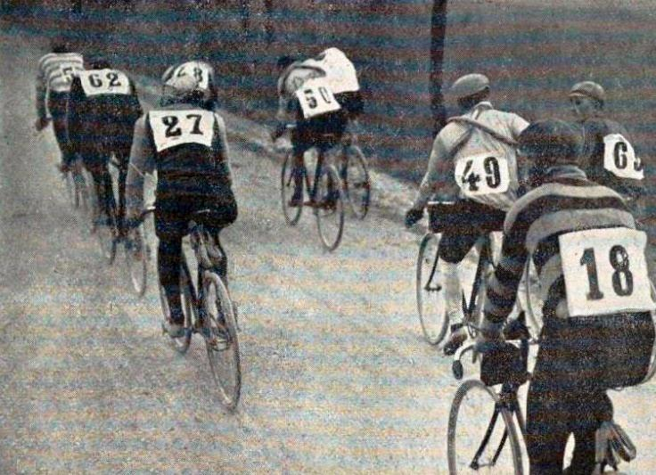 Tour de France 1906, le peloton près d'Albert.